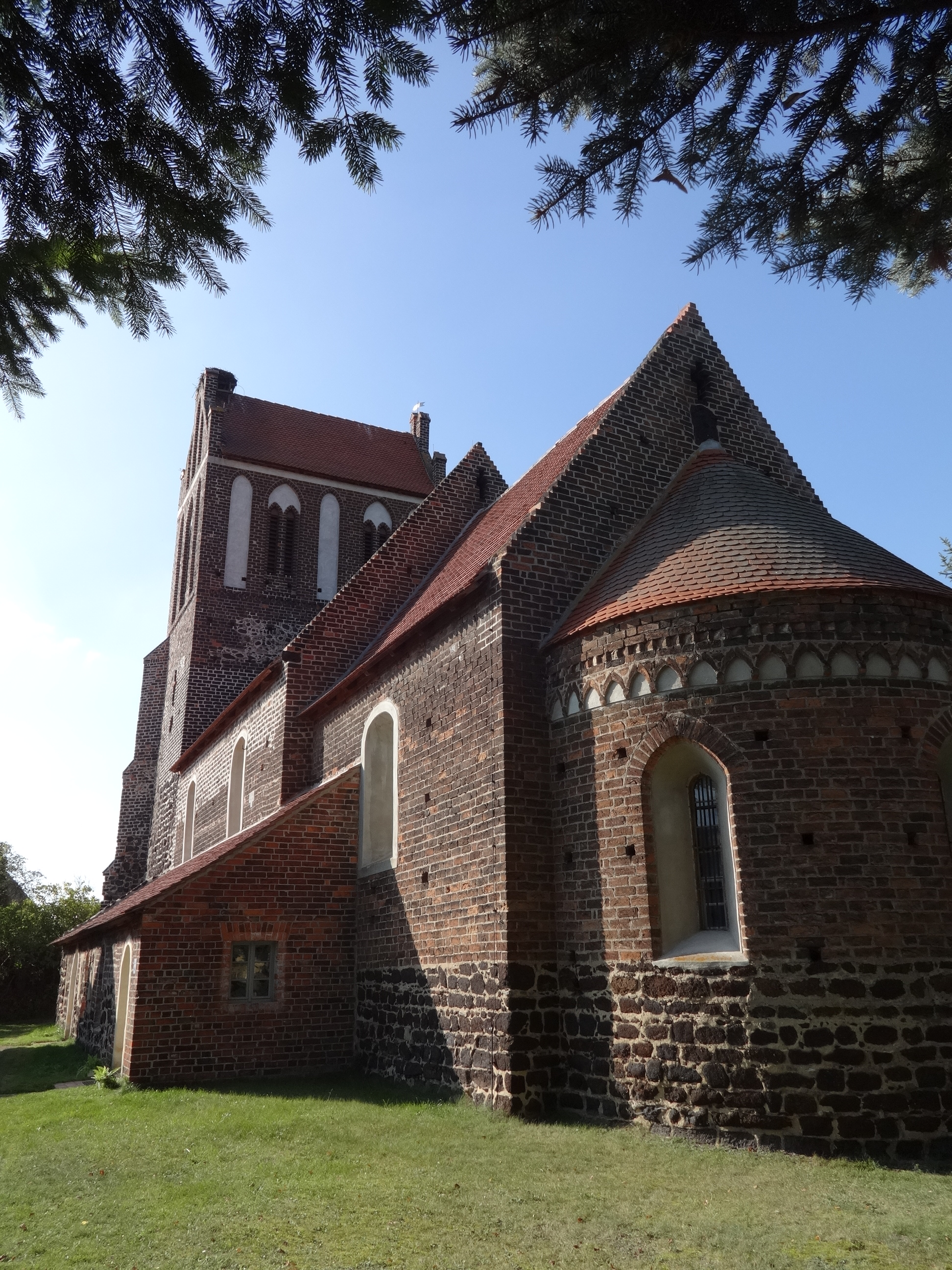 Blick von Osten auf die Dorfkiche in Schönborn-Lindena